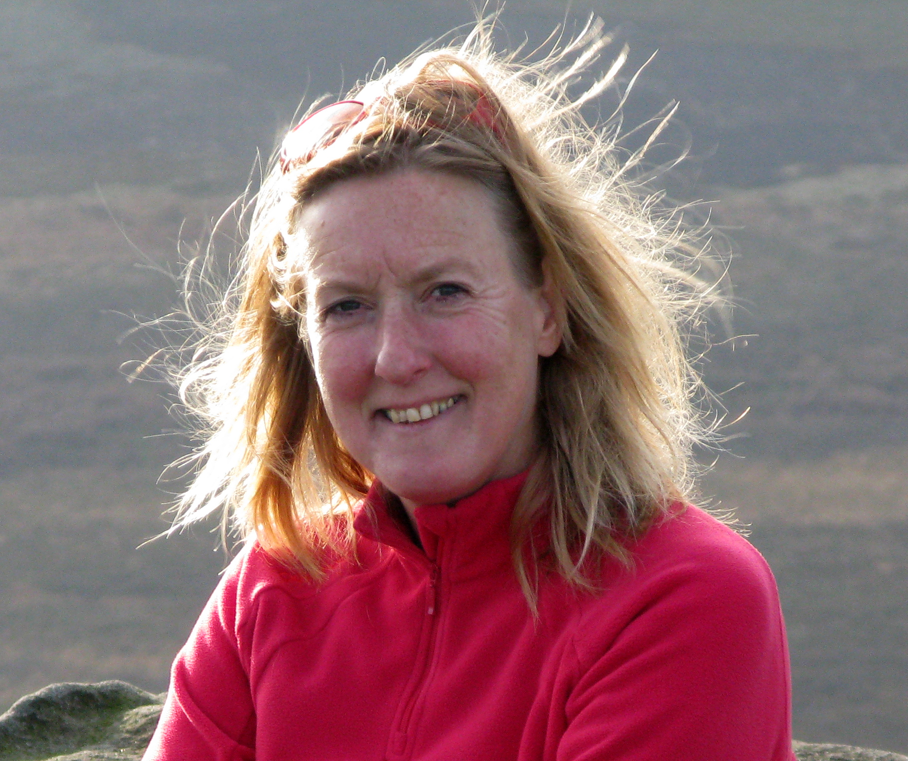 Portret van kunstenaar Elly Baltus